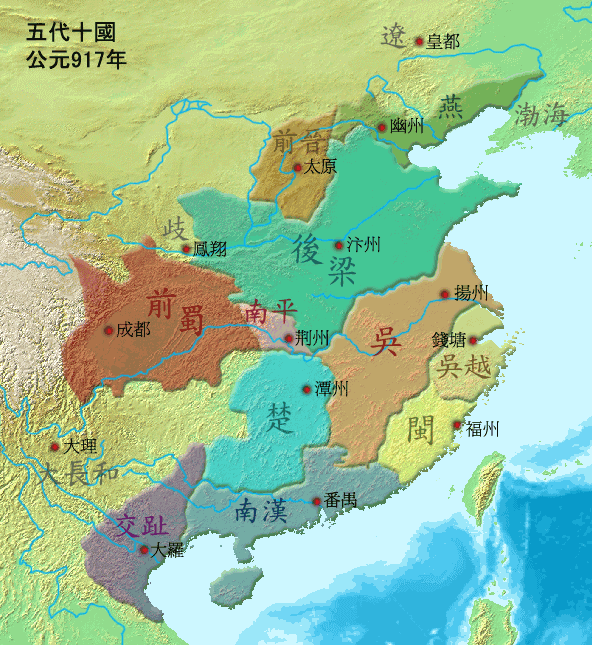 五代十國初期